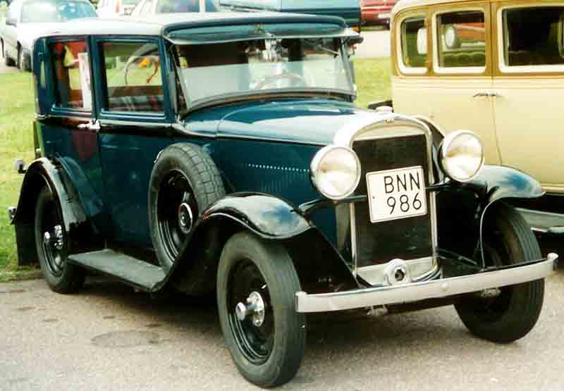 Opel 1,8 Liter Serie 18 B 4-Door Limousine 1931